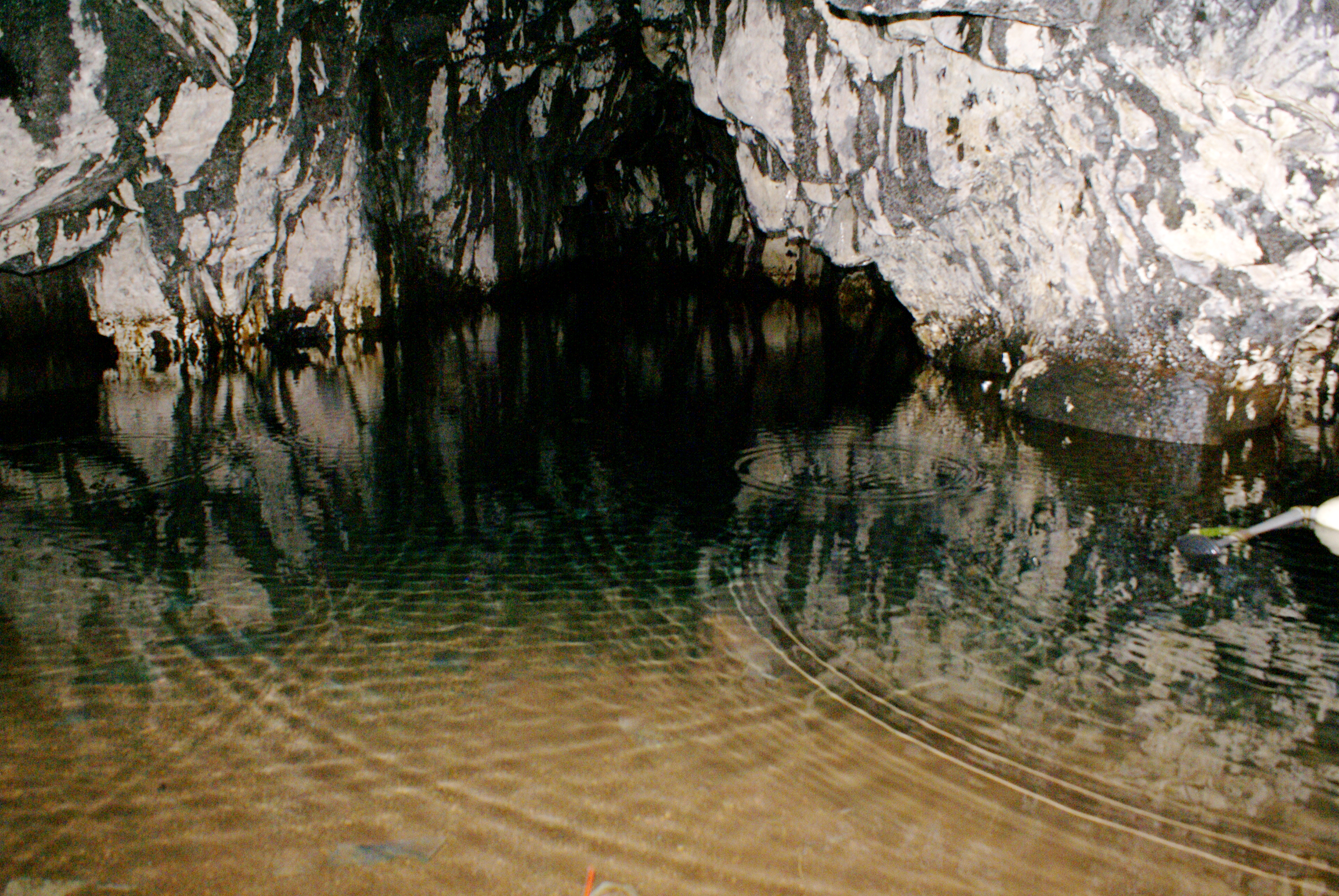 Furna do Poio 10, Caldeira de Santo Cristo, Calheta, ilha de São Jorge